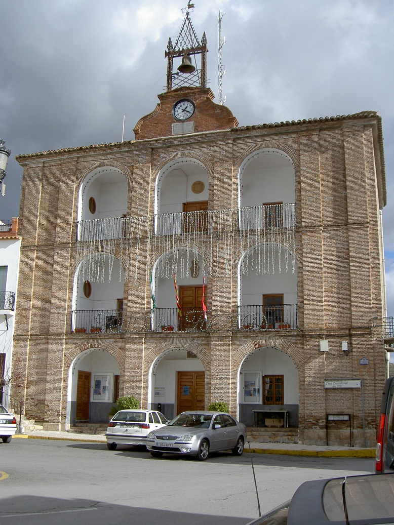 Fachada principal del Ayuntamiento de Laujar de Andarax